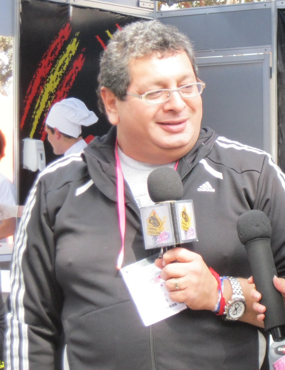 Ricky Tosso en entrevista